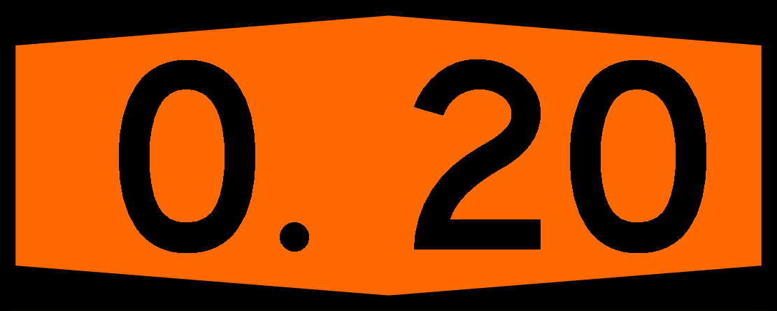 Otoyolu 20